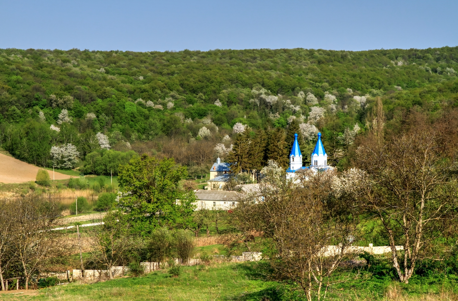 Rezervația peisagistică Țigănești (cod MD-CL-rp-012)